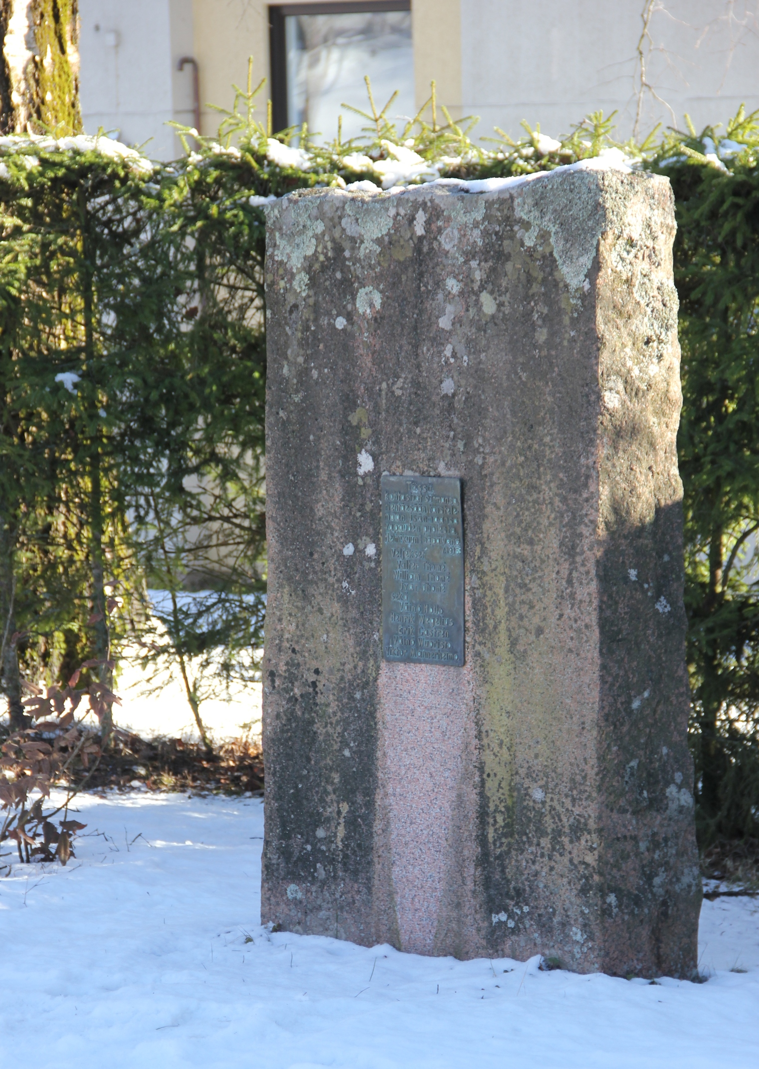 Thomén ryhmä, Vihdin teloitukset 1. helmikuuta 1918. Muistolaatta Ojakkalaan lähtevän tien varressa Nummelassa.